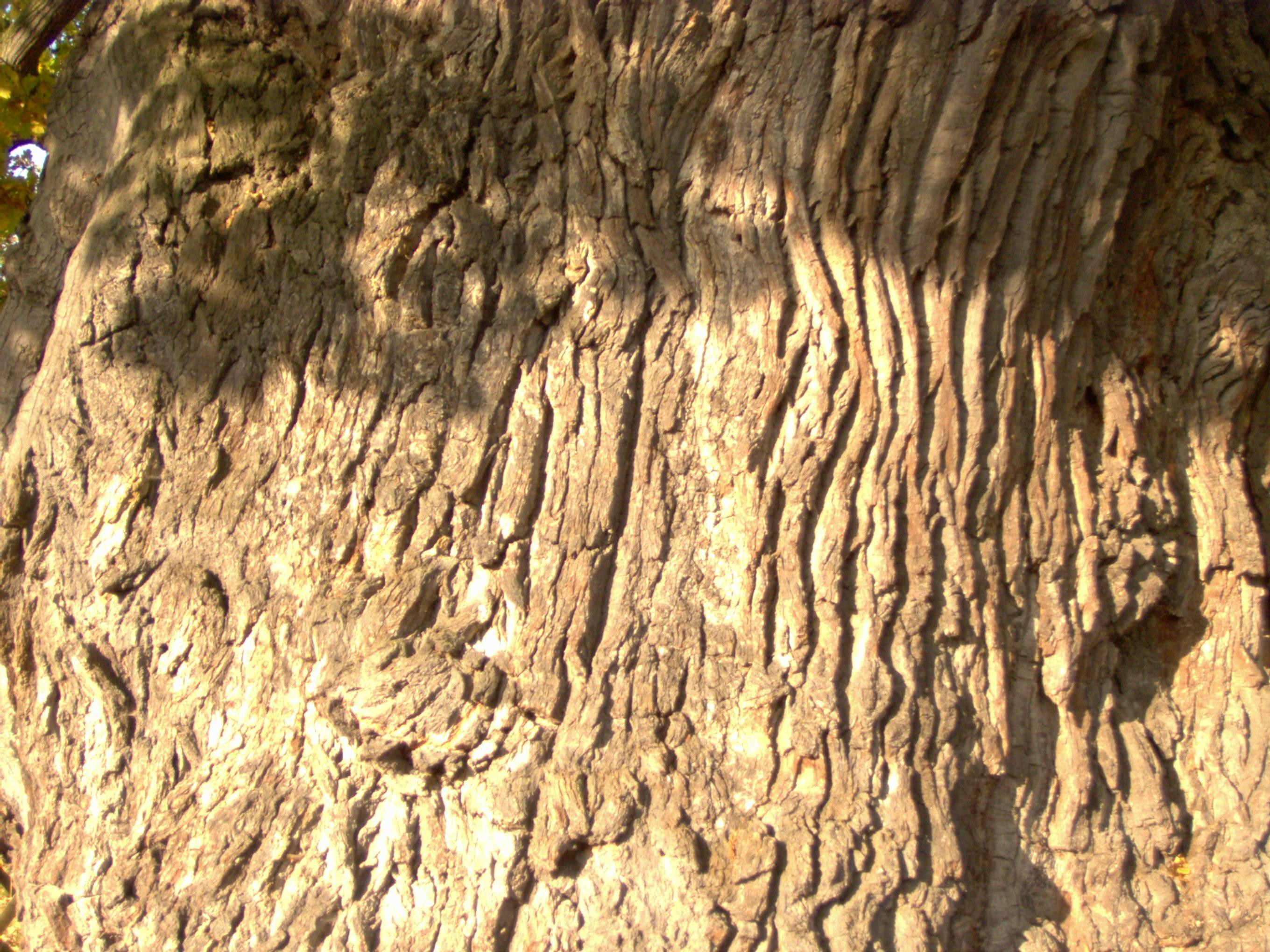 Borke am Stamm der Volkenrodaer Königseiche.